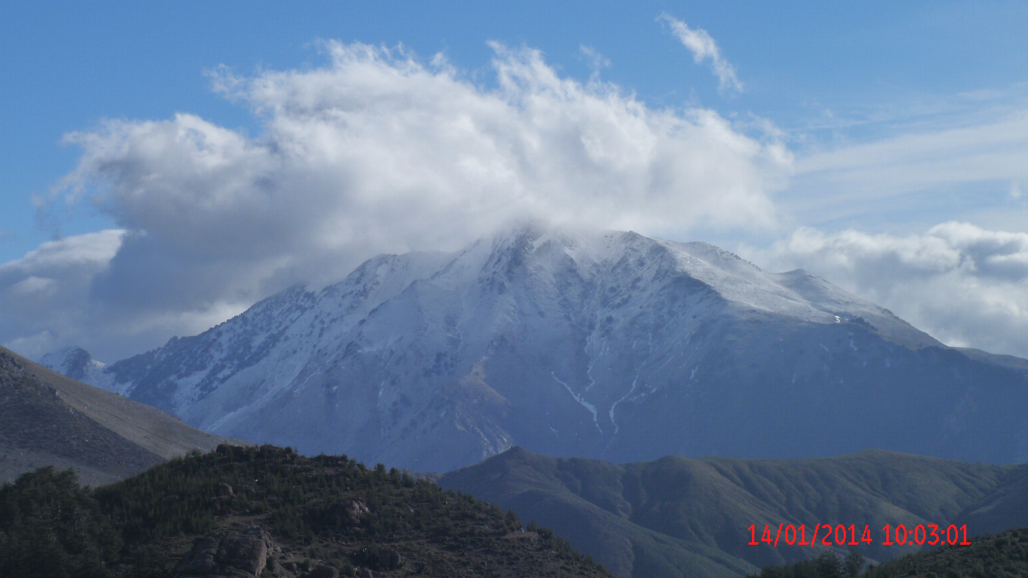 Neige et nuages sur le mont Lalla Khadidja